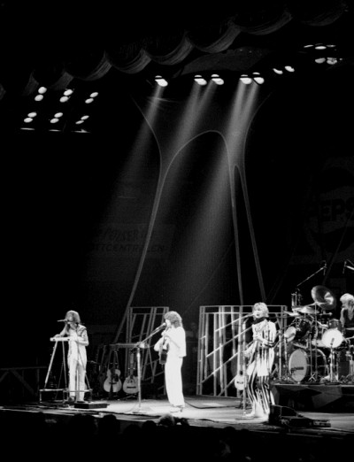 Yes, Ekeberghallen, Oslo, Norway